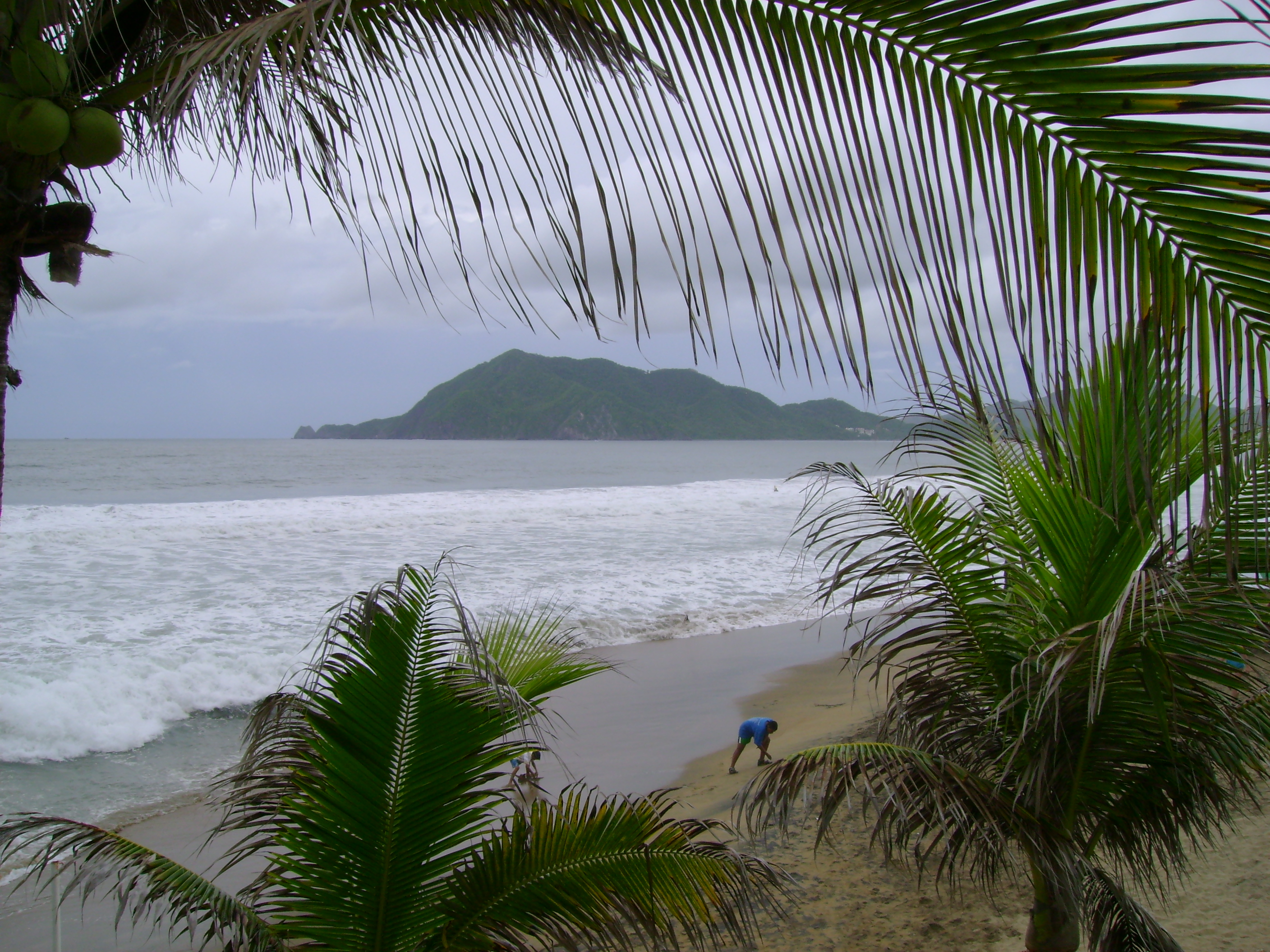 Vista de la playa Olas Altas desde el restaurante Las Margaritas.